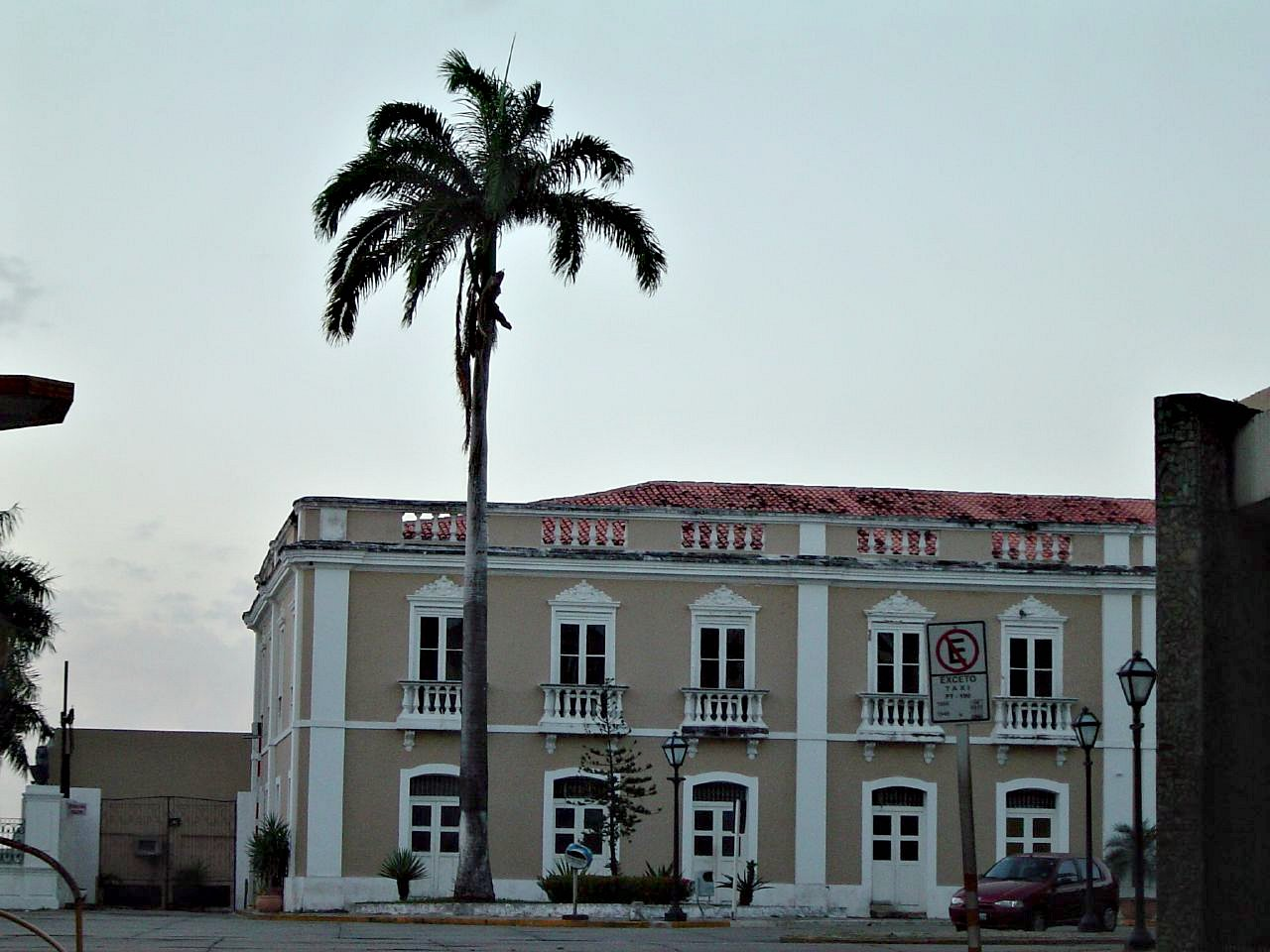 Este prédio é datado de 1689. Sabe-se que nele funcionaram, nos primeiros tempos, a Casa da Câmara e Cadeia, presidida por Simão Estácio da Silveira. Passou por várias reformas e, mais tarde, foi denominado Palácio La Ravardiere, sede do Governo Municipal, onde até hoje se encontra erguido o busto do Daniel de La Touche.